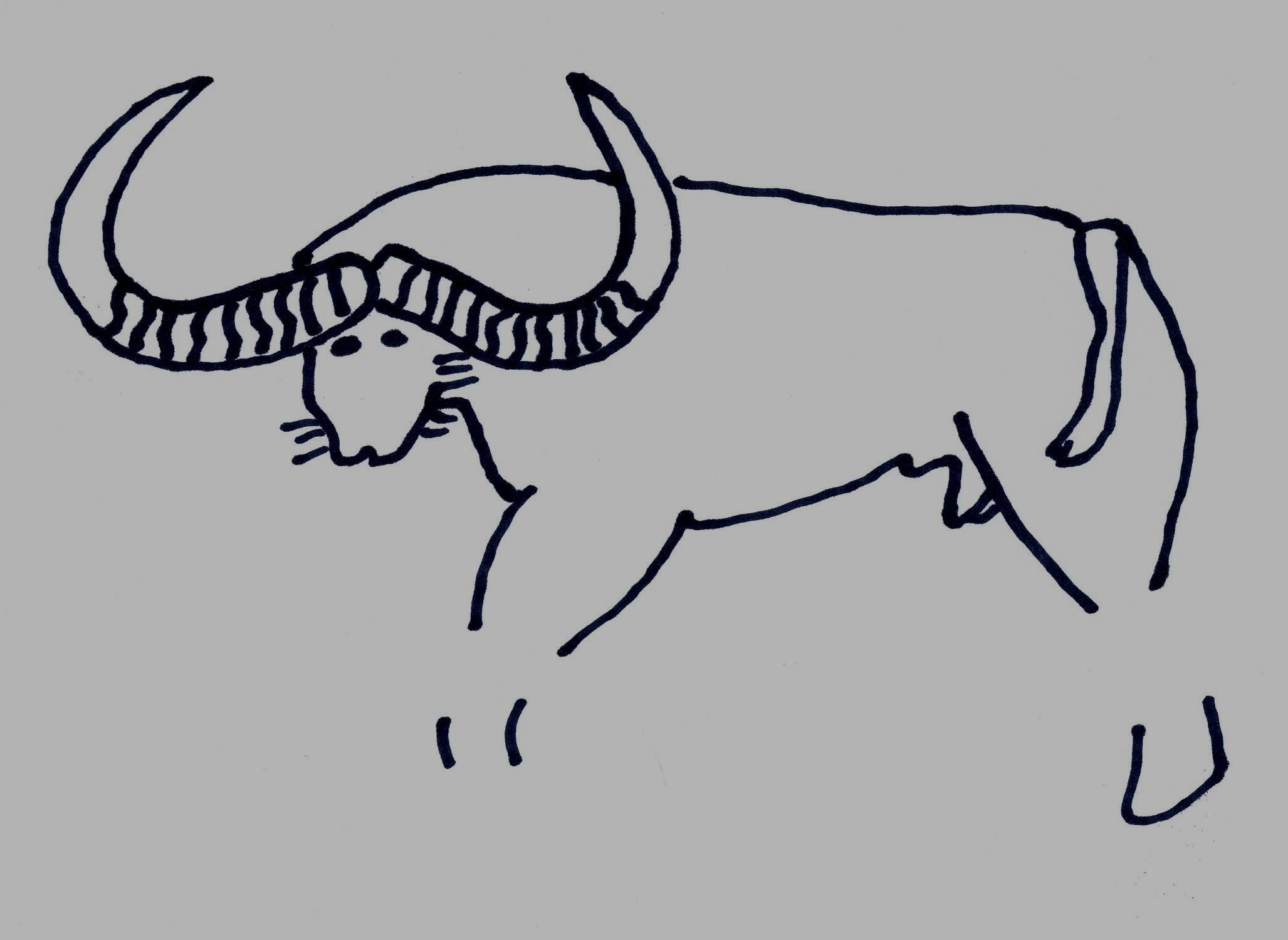 Gravure préhistorique de El Hesbaia, région de Djelfa, Algérie, plus précisément Oued el Hesbaïa Daïra de Sidi Makhlouf la Wilaya de Laghouat : croquis schématique